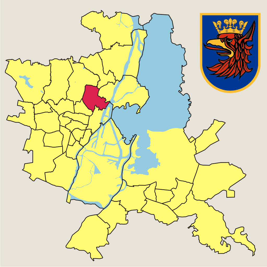 Osiedle "Żelechowa" w Szczecinie – jednostka pomocnicza miasta w 2010